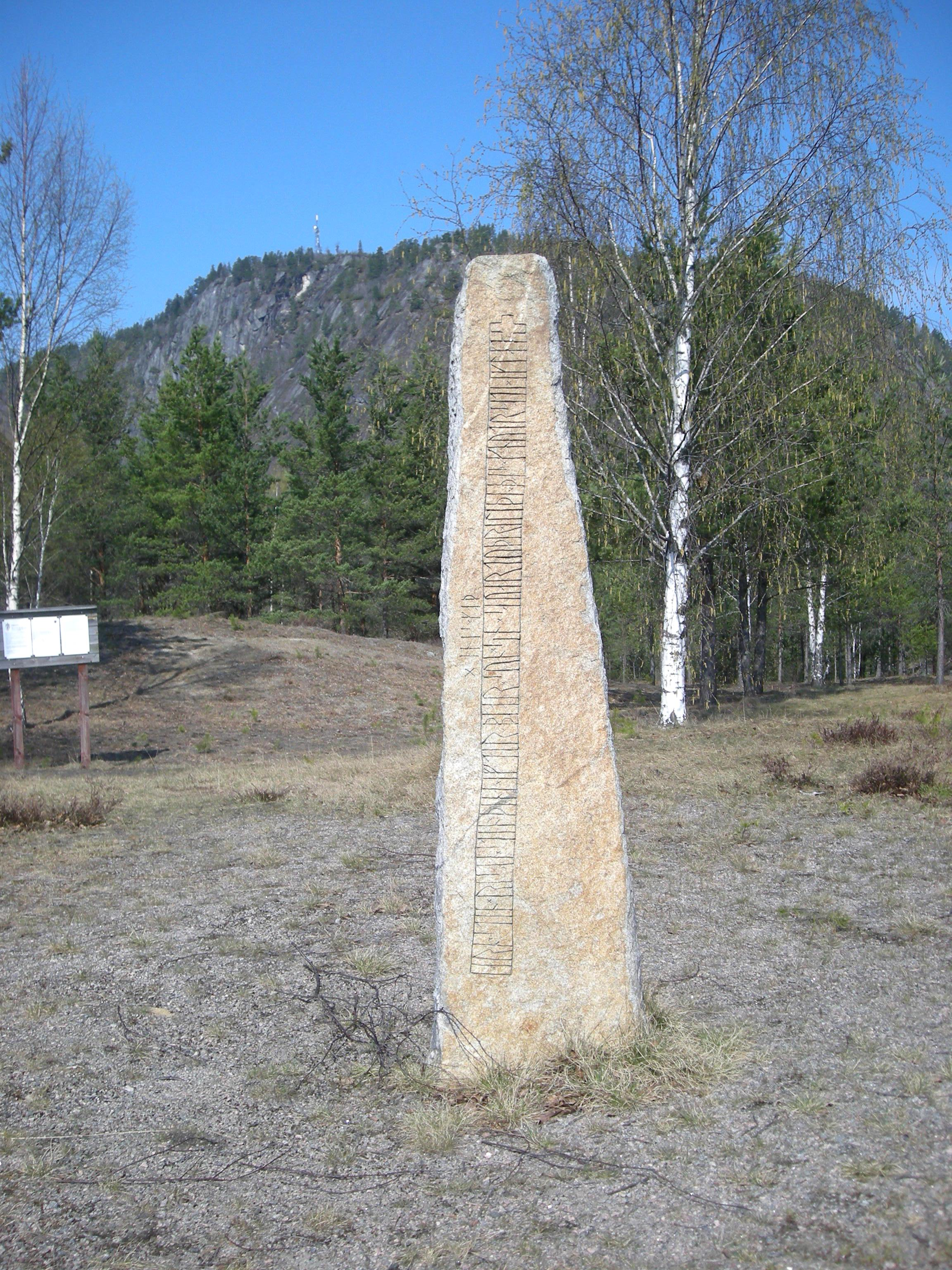 Kopi av Galtelandssteinen på Evje, nær det opprinnelige funnstedet